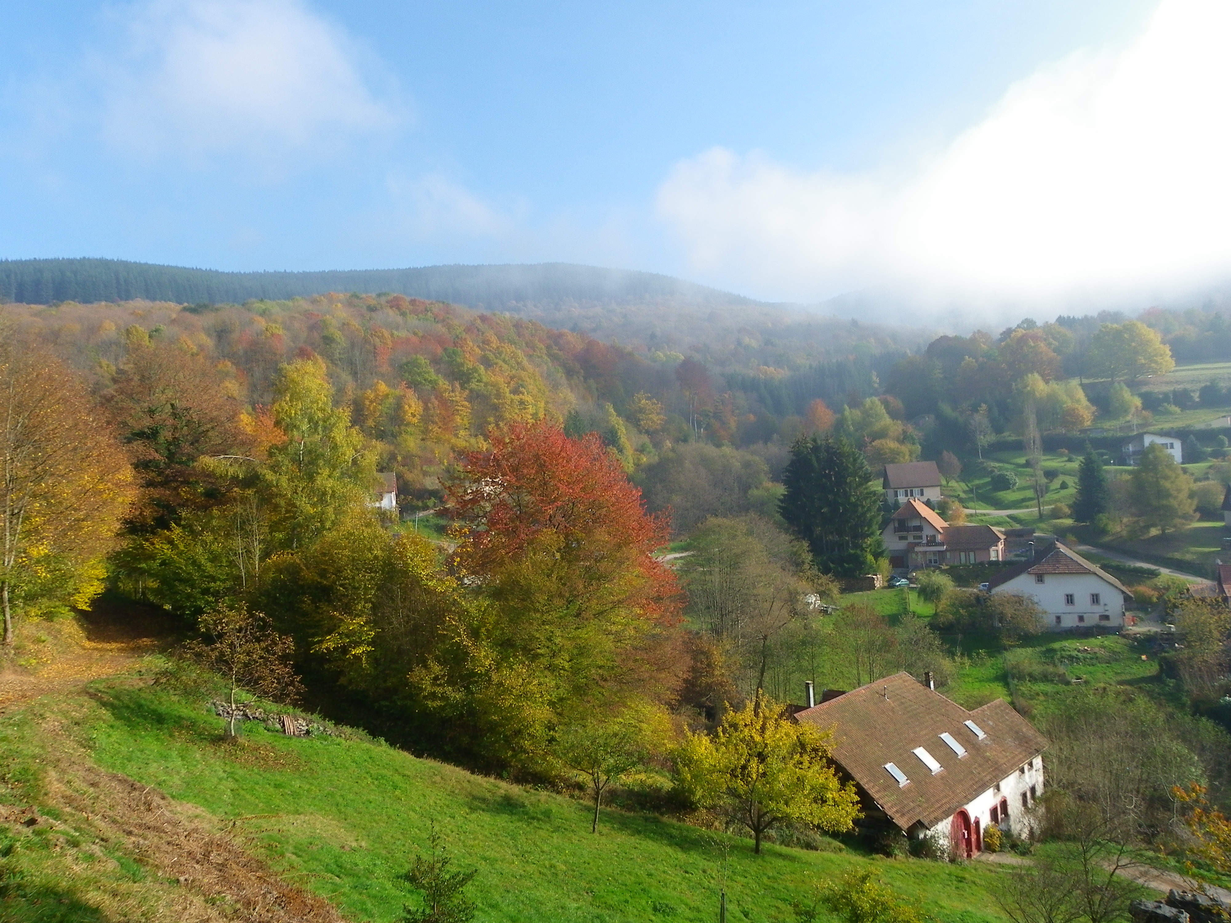 Waldersbach en automne, au dessus du "beausite", vue vers Belmont